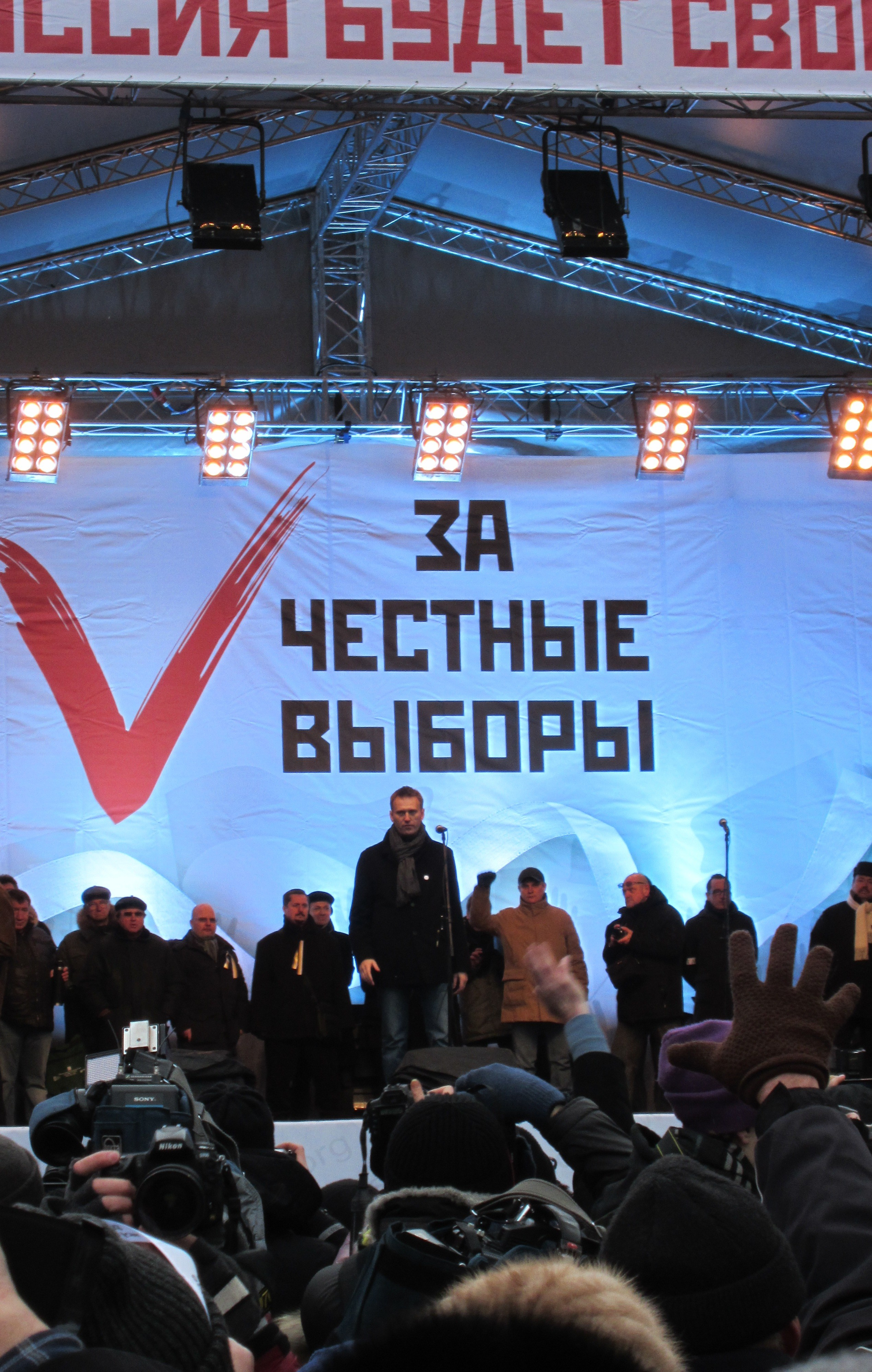 Митинг 24 декабря на проспекте Сахарова; выступление Алексея Навального с трибуны митинга